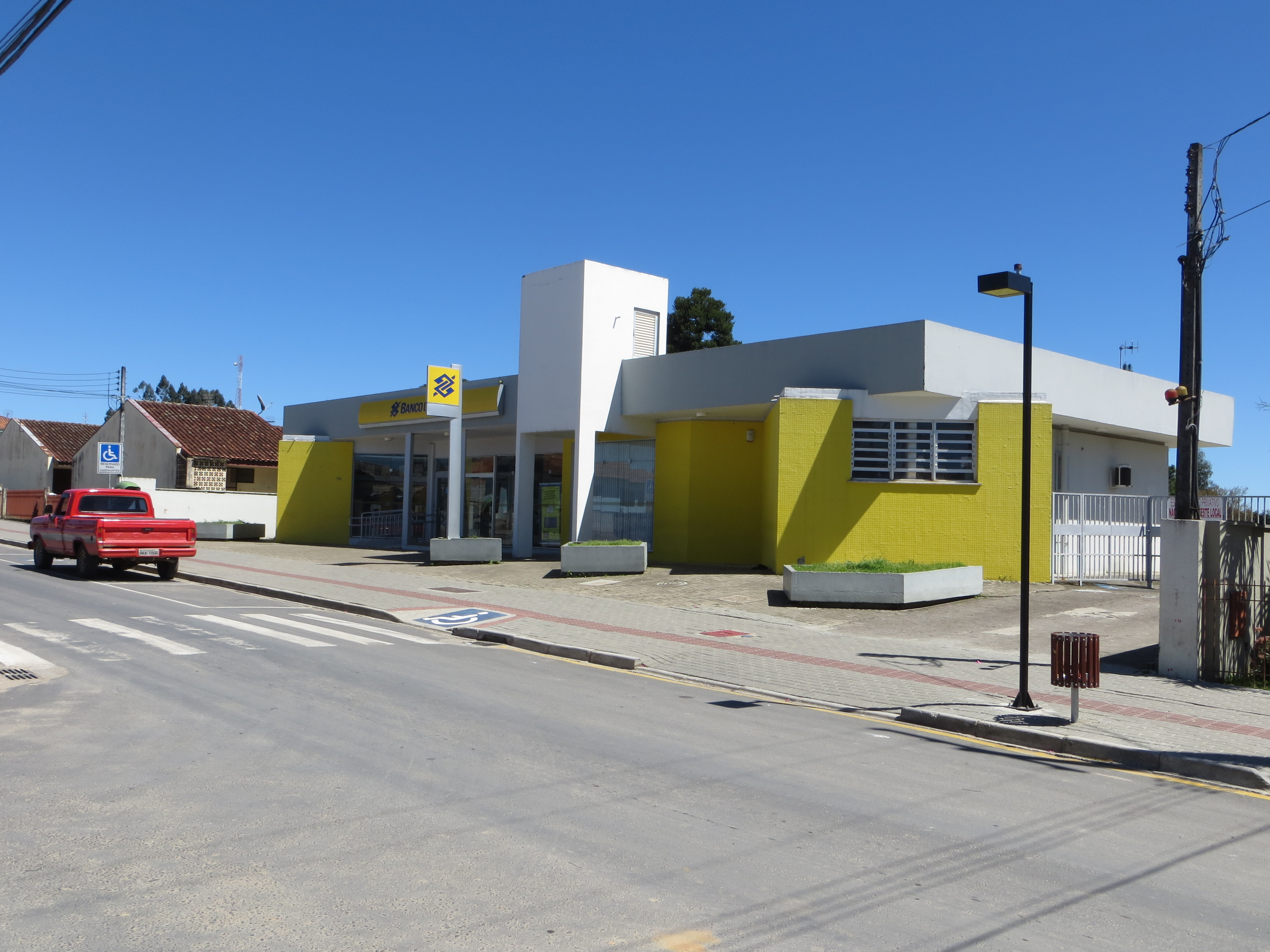 Agência do Banco do Brasil em São João do Triunfo, estado brasileiro do Paraná, região sul do país.